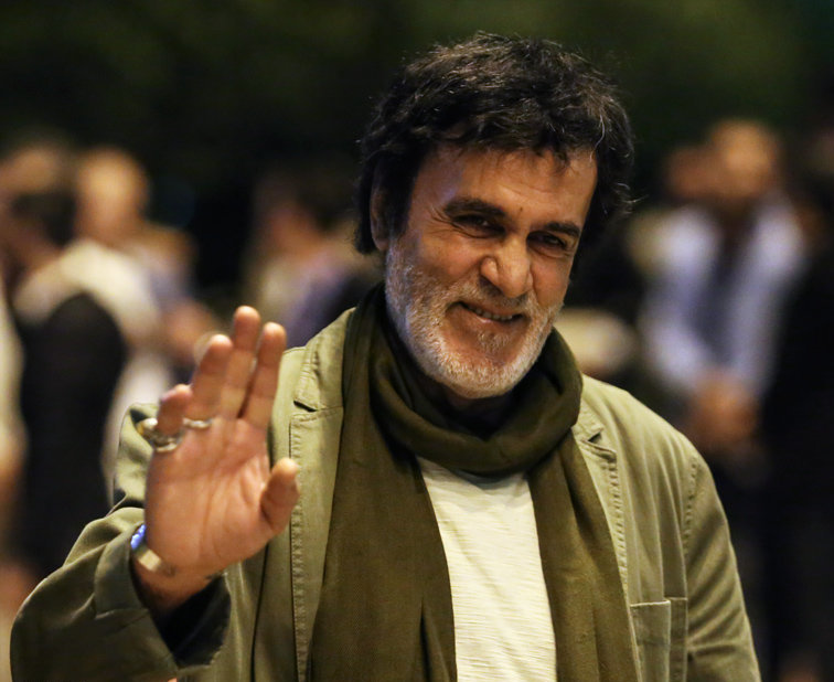 حبیب محبیان در سومین جشن سالانه موسیقی ما